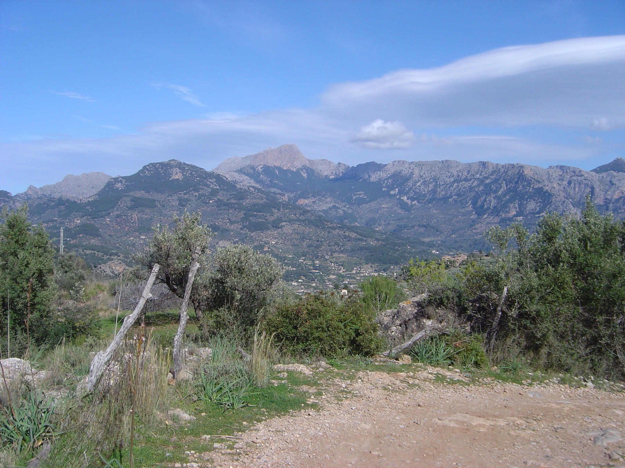 Puig Major, des del camí de Castelló. Mallorca.